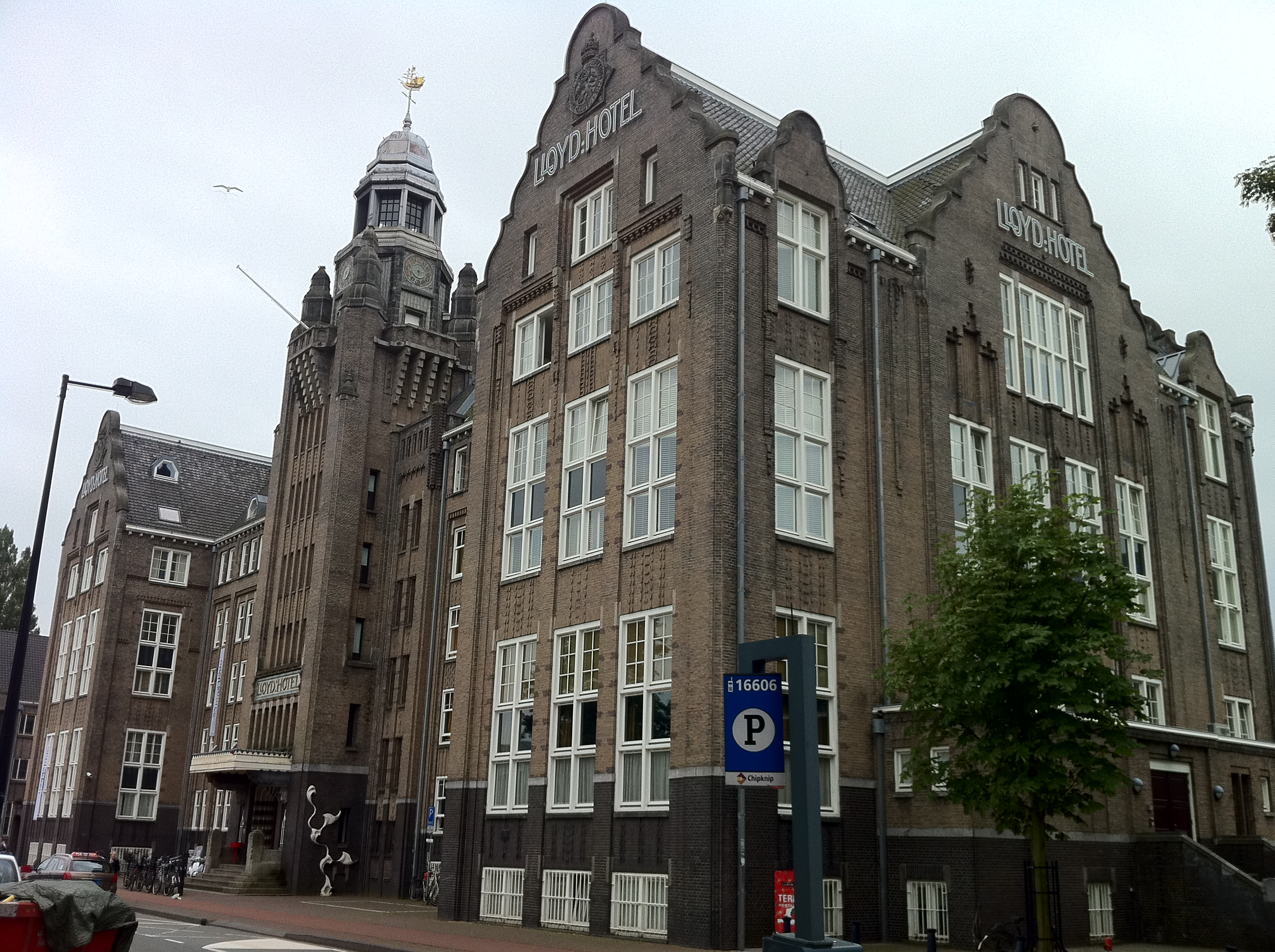 Lloyd Hotel Amsterdam Oostelijke Handelskade